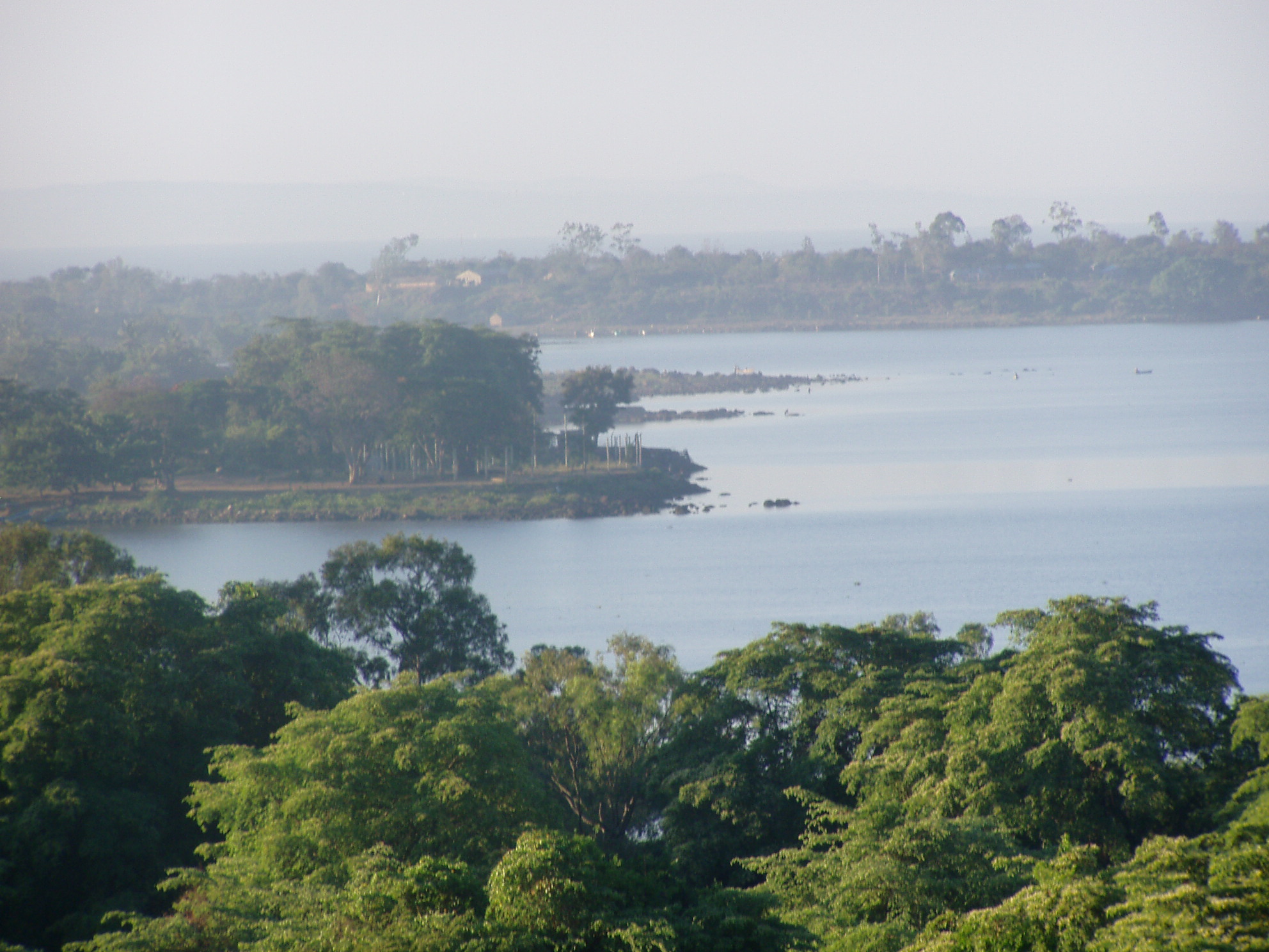 Lake Victoria